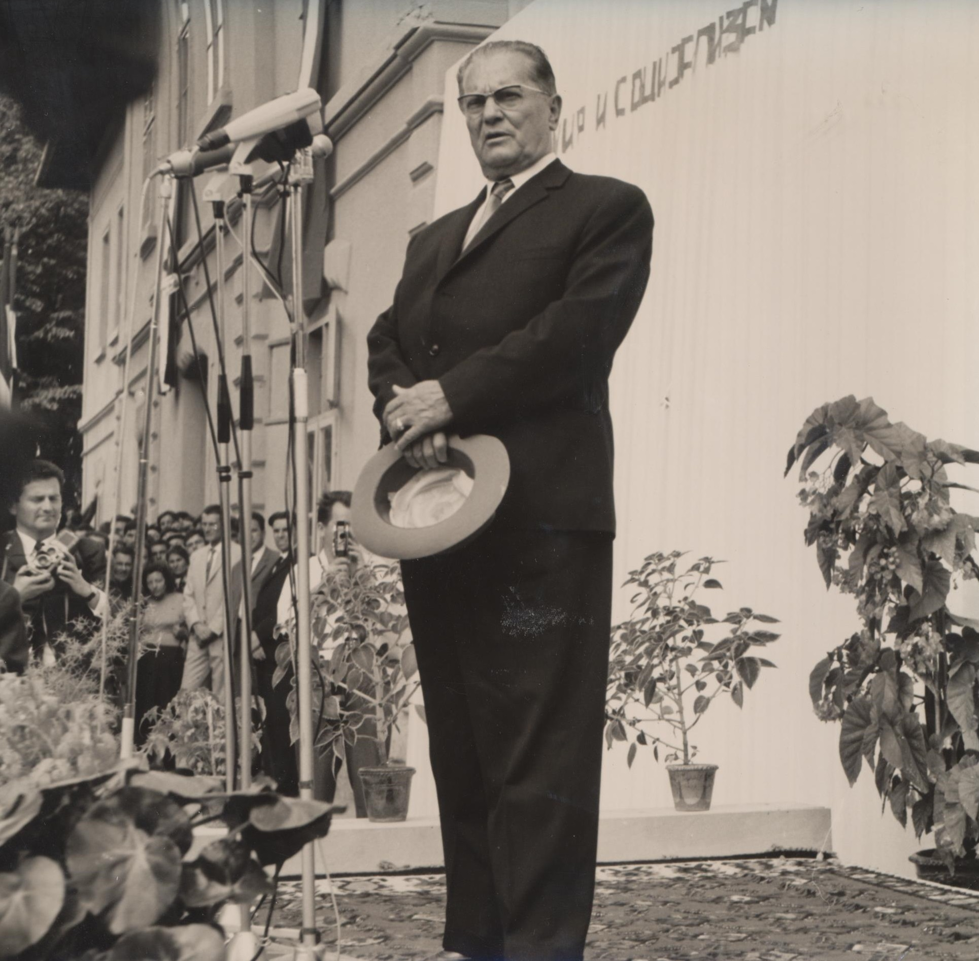 Tito drzi govor na platou ispred zeleznicke stanice u Pirotu